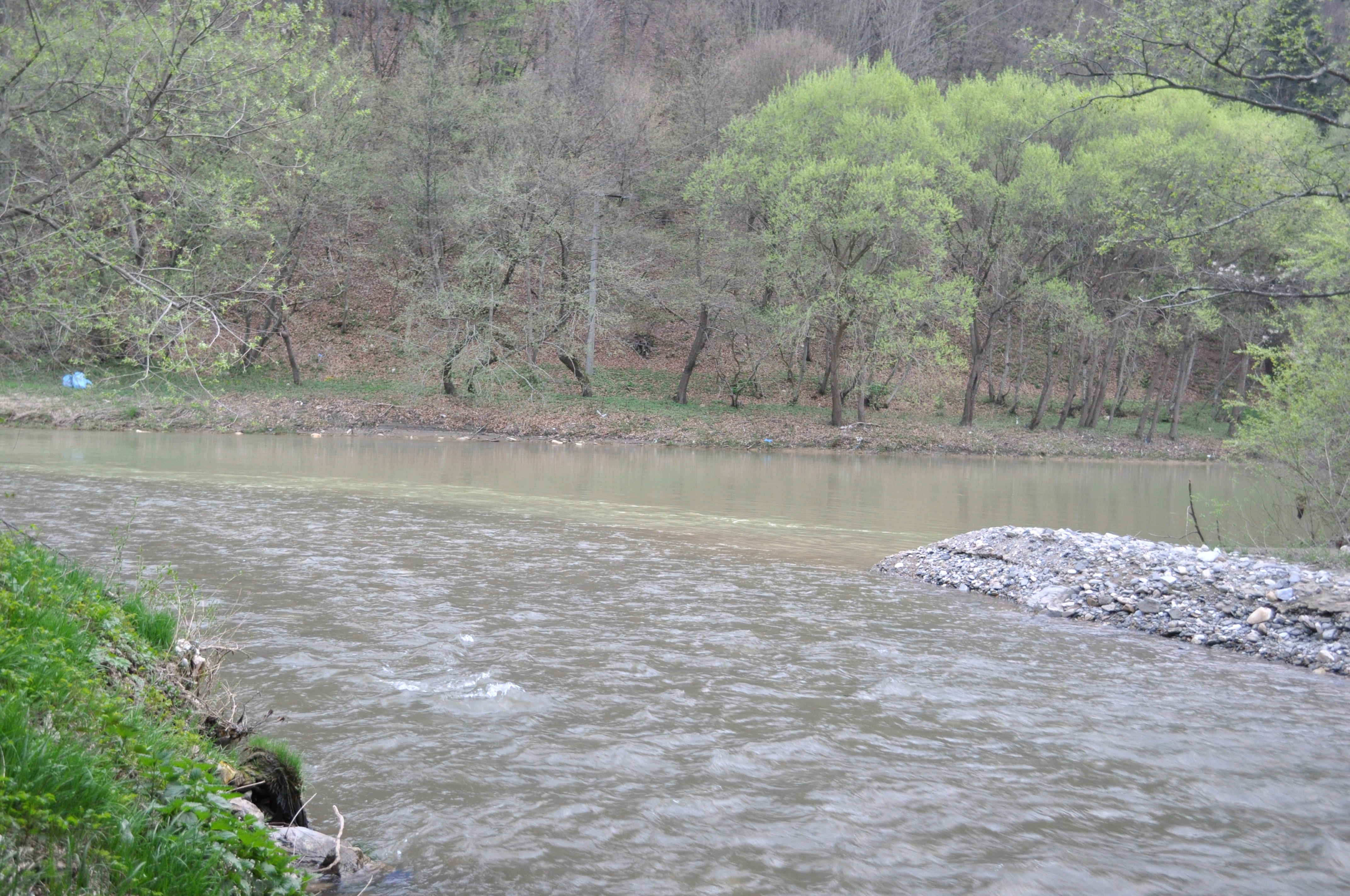 Mündung des Ocolișel in den Arieș, im Kreis Cluj, RumänienRomână: Râul Ocolișel la vărsarea în Arieș, județul Cluj, România